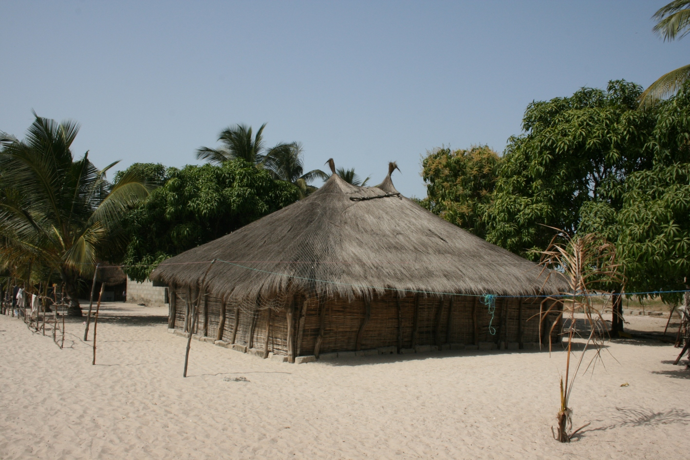 Une maison diola sur l’Île de Karabane, Casamance, Sénégal